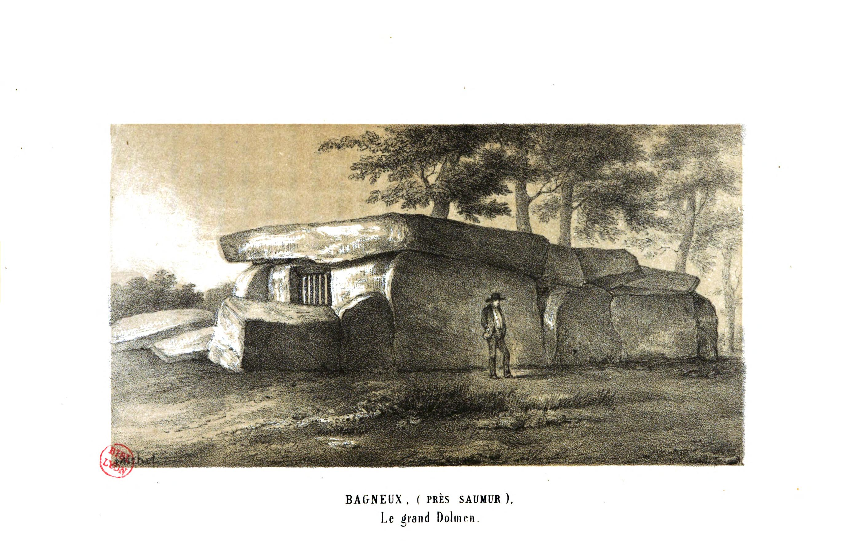 Lithographie d'Antoine-Etienne Carro représentant le grand dolmen de Bagneux (près Saumur)